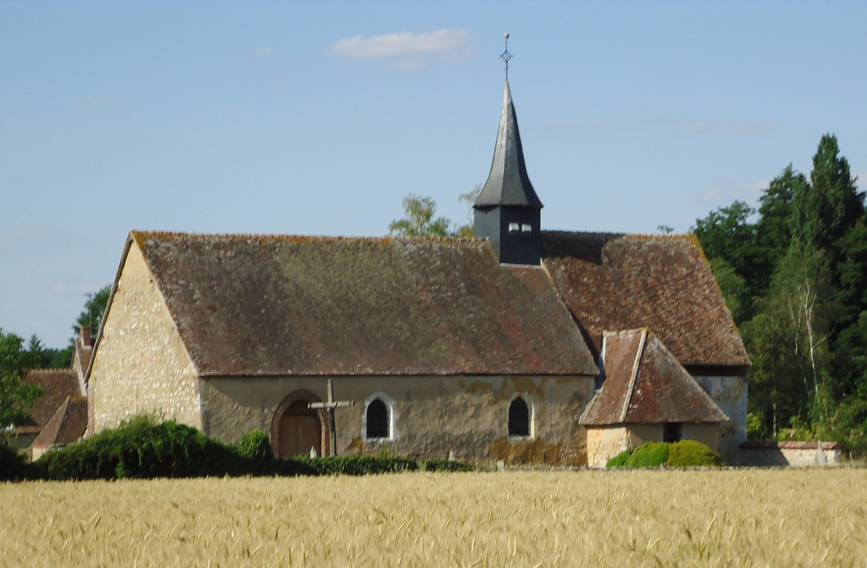 Eglise Saint-Aignan de Blandey - Roman - Eure (27)